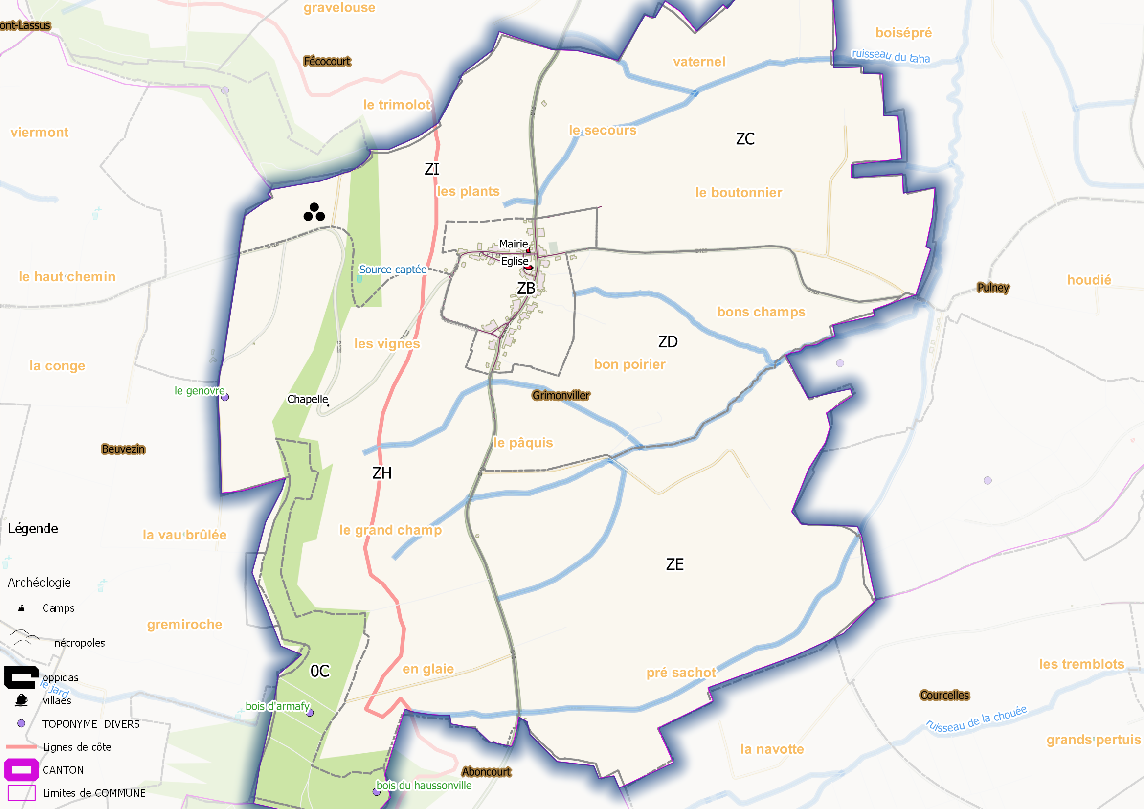 Grimonviller (ban communal) OSM et Qgis, mentions additionnelles